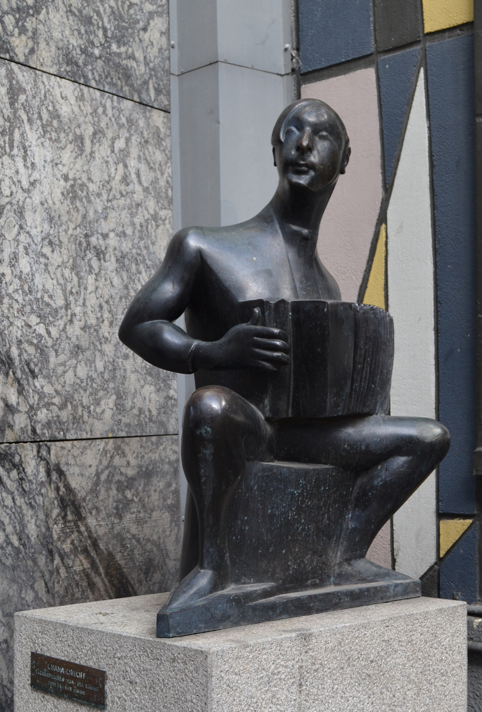 Per Krohg, Norwegian painter, by sculptor Chana Orloff, 1924